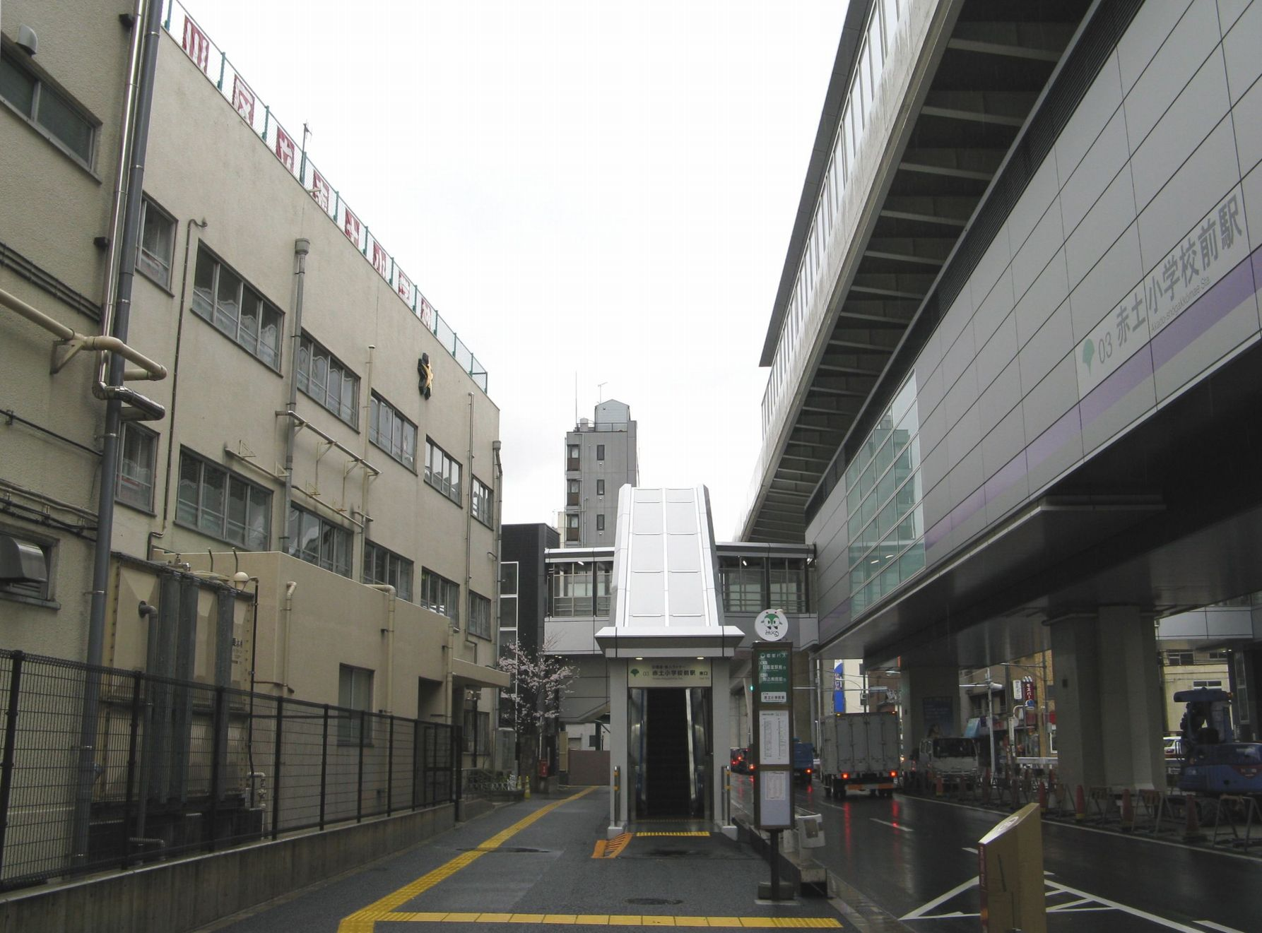 荒川区立赤土小学校（左）と赤土小学校前駅 尾久橋通りを南望